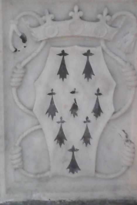 Détail du tombeau de François II de Bretagne et Marguerite de Foix (Cathédrale de Nantes) : un blason avec les hermines bretonnes entourées d'une couronne à fleur de lys (royaume de France)